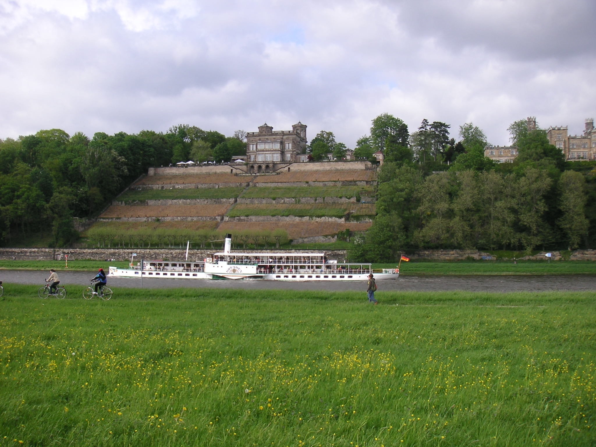 Dresden Lingnerschloss (Villa Stockhausen) mit Dampfer „Dresden“; Drei-Elbschloesser